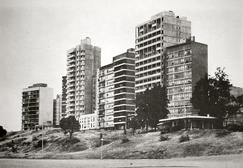 Vista de edificios de barrio Martin sobre Av. de la Libertad. Año 1971.